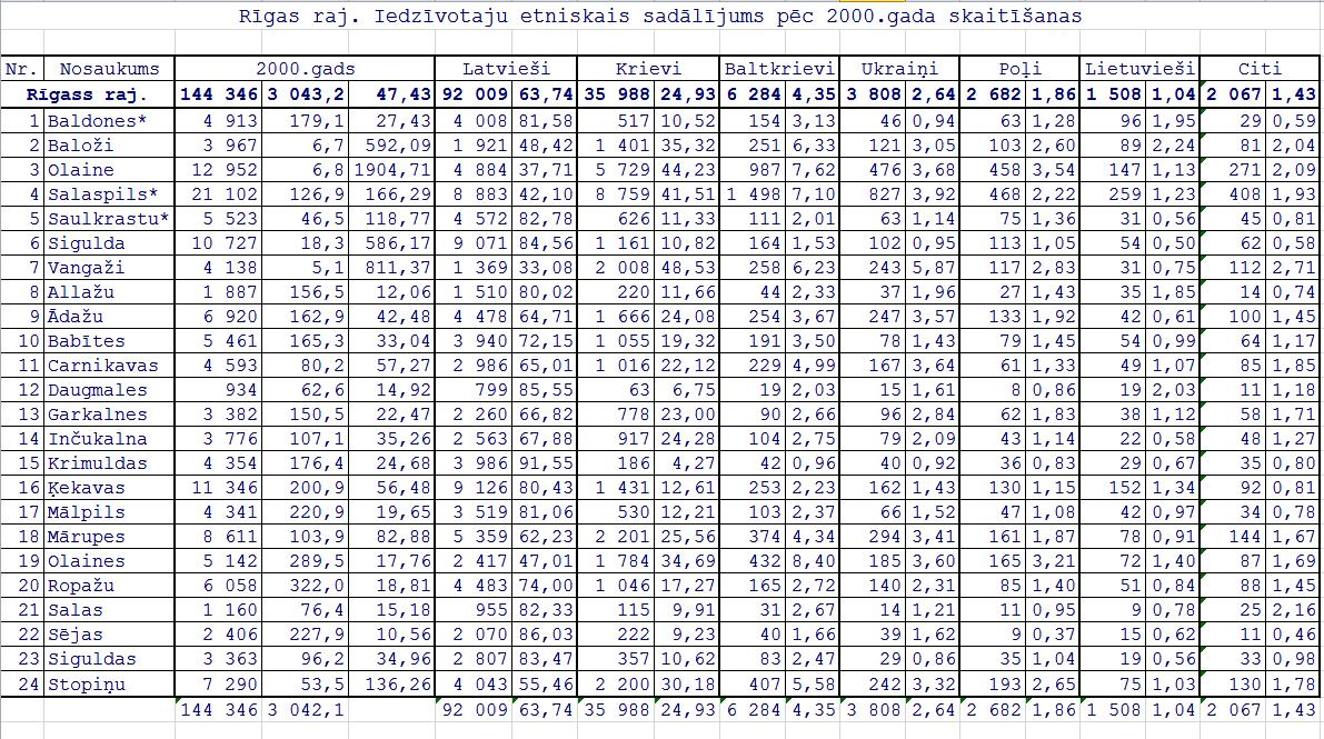 результаты переписи населения Латвии ни 01.04.2000